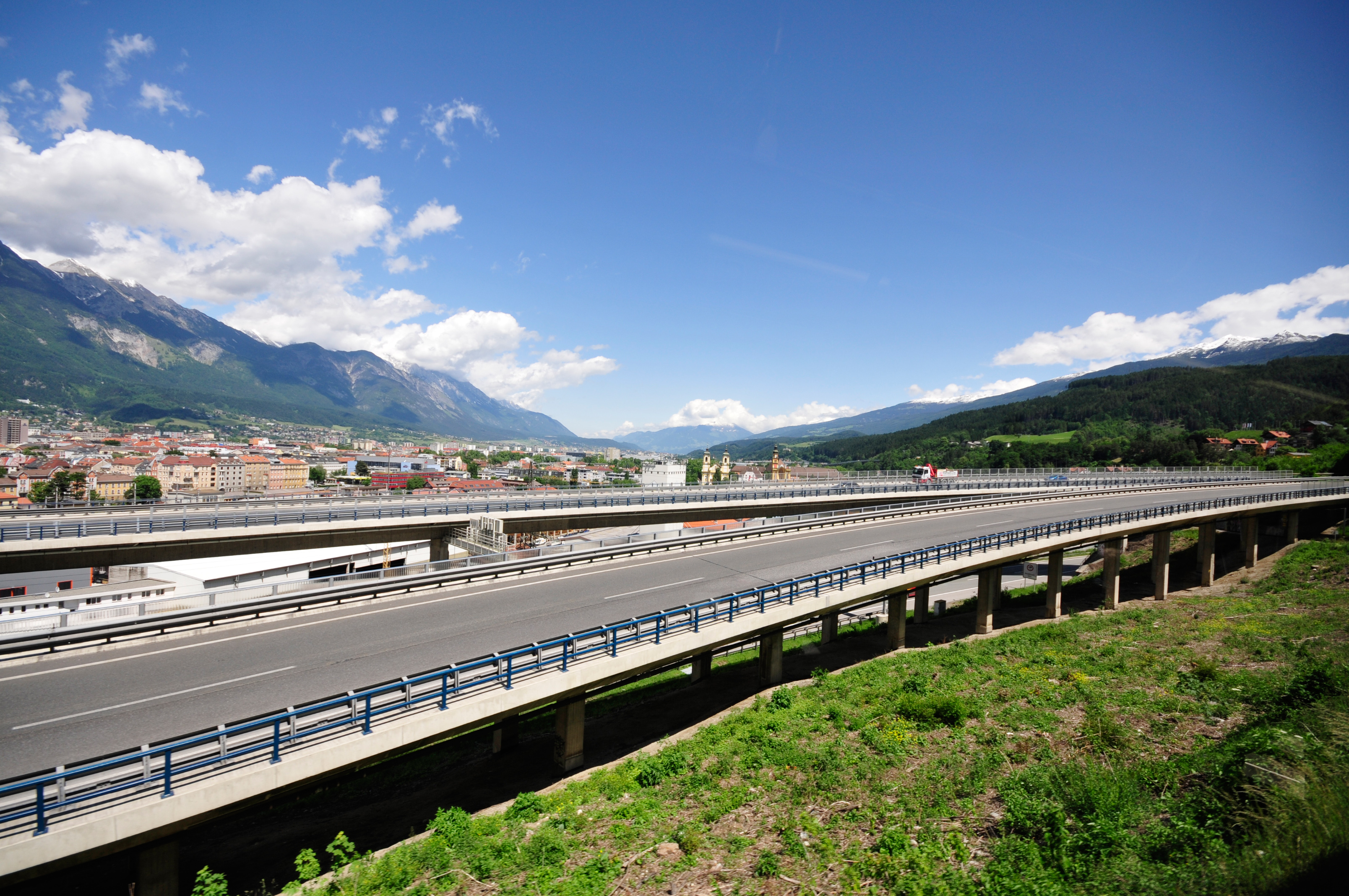 Innsbruck, Brennerautobahn Im Rahmen des Fußballländerspiels Österreich gegen Rumänien bin ich einige Stunden durch Innsbruck gefahren und habe Aufnahmen gemacht, die vielleicht mal gebraucht werden könnten. --Ralf Roleček 11:20, 10 June 2012 (UTC) The making of this work was supported by Wikimedia Austria. For other files made with the support of Wikimedia Austria, please see the category Supported by Wikimedia Österreich.